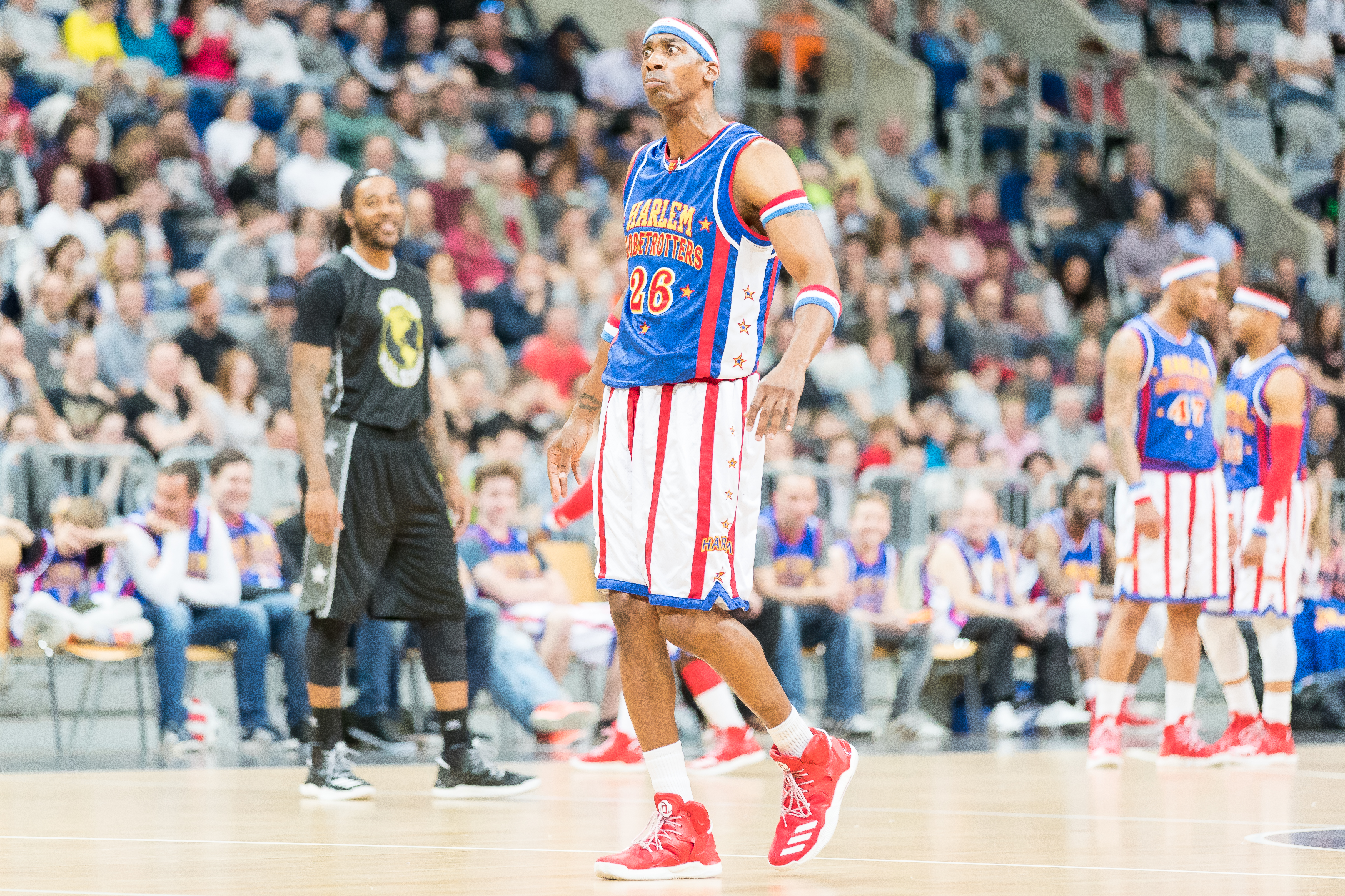 Harlem Globetrotters during Harlem Globetrotters at SAP Arena, Mannheim, Baden-Württemberg, Germany on 2017-03-27, Photo: Sven Mandel